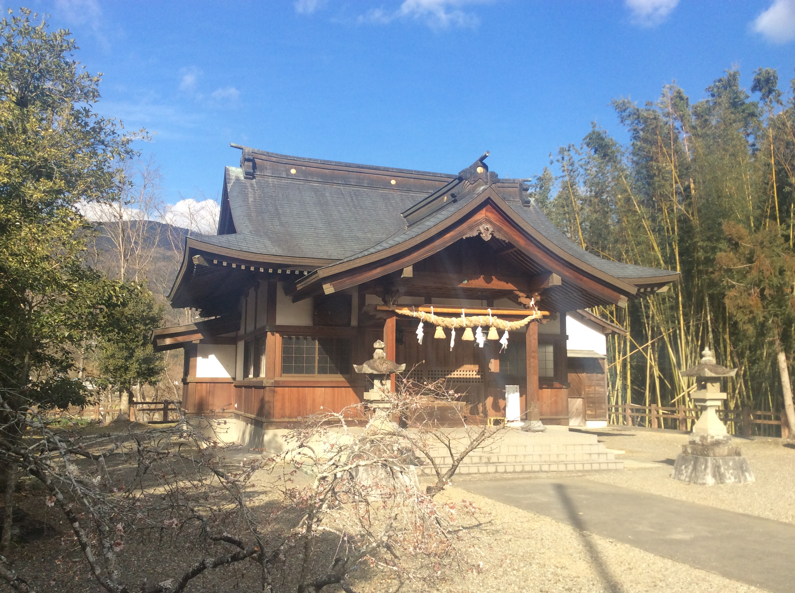 伊射奈美神社（美馬町）